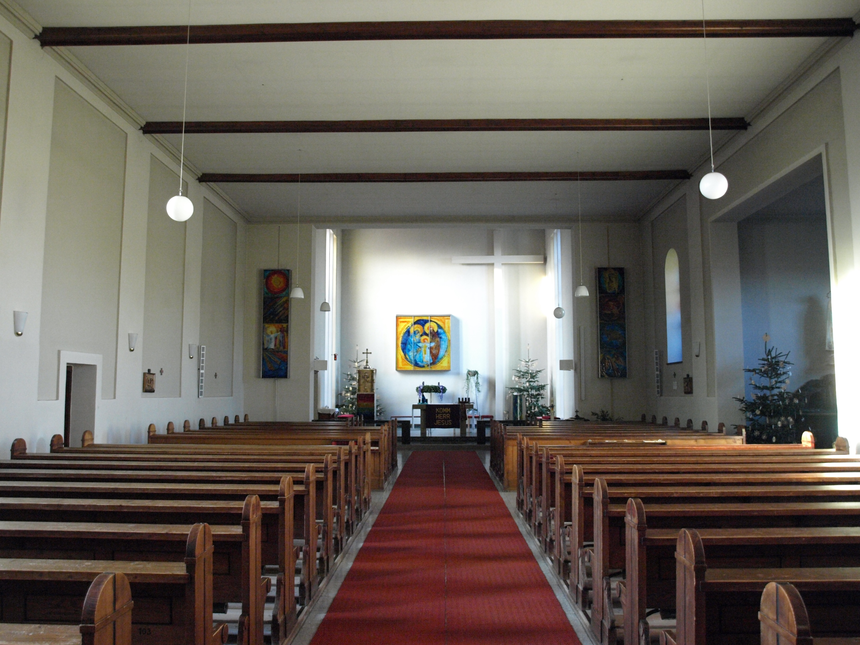 Kath. Pfarrkirche Hl. Familie